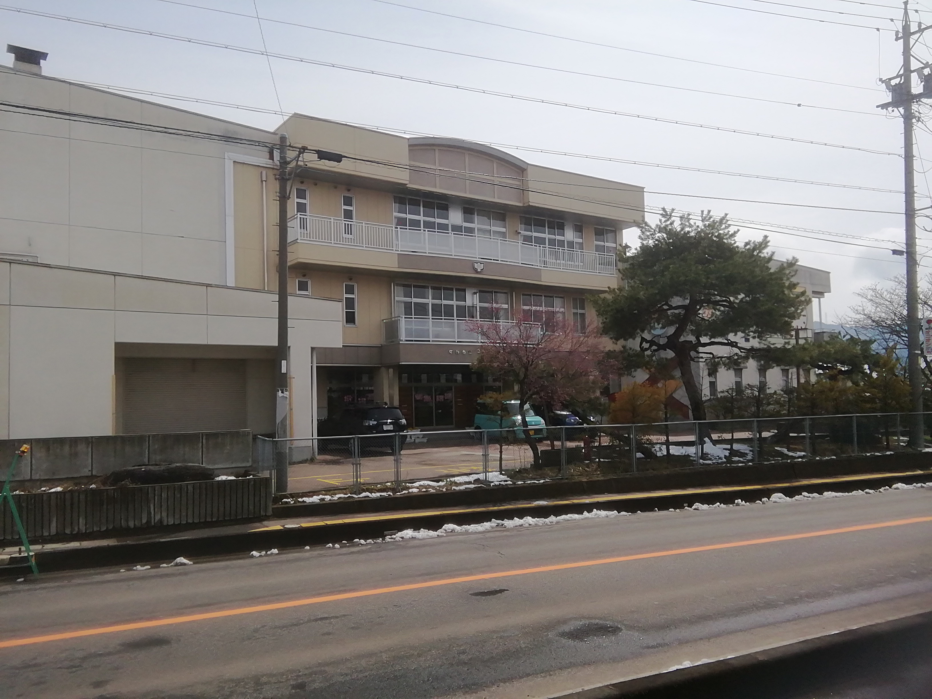 中野市立平野小学校（2020-3-30）